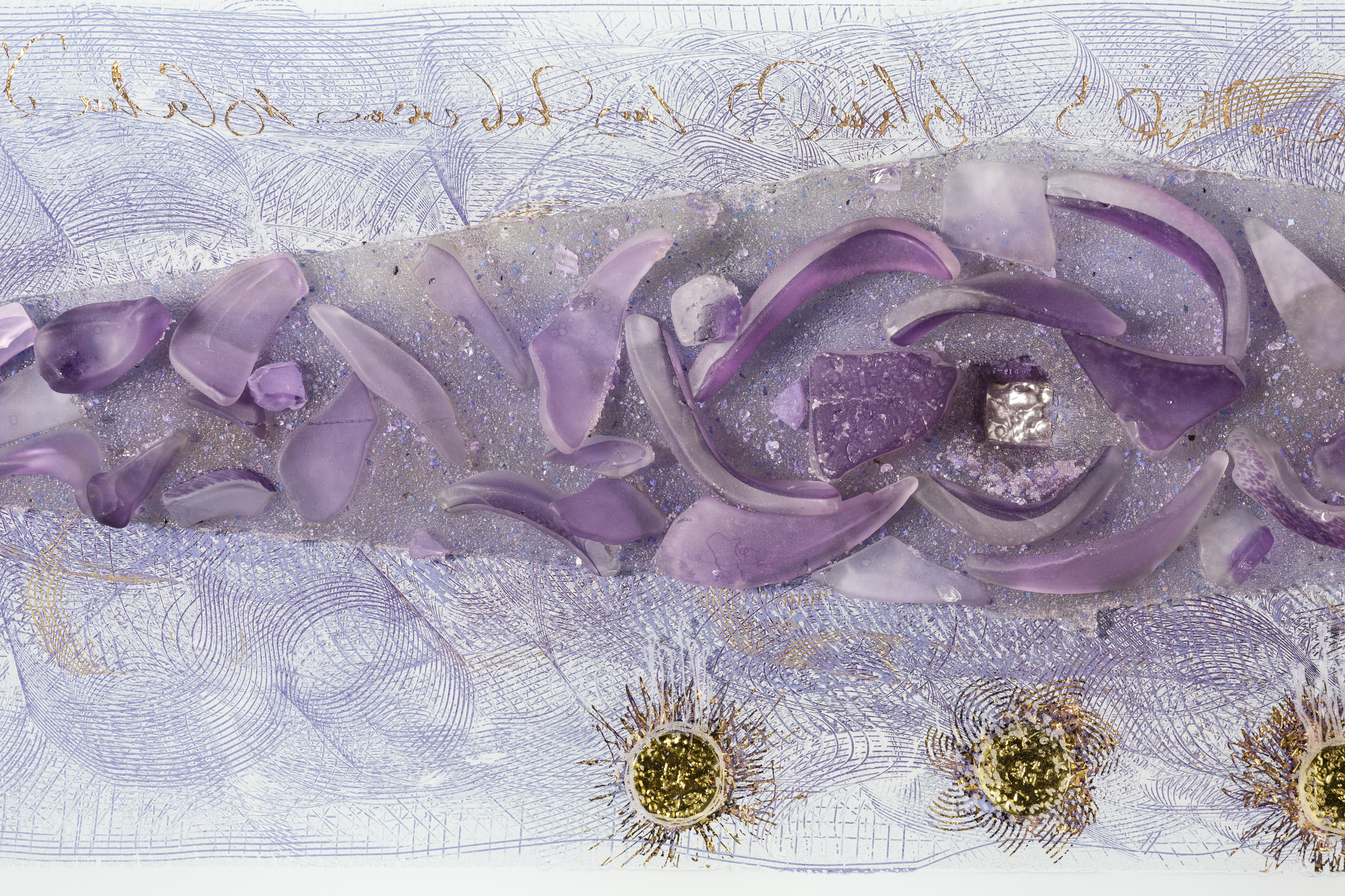 Photo de Cédric Bossard Œuvre de Jean Divry